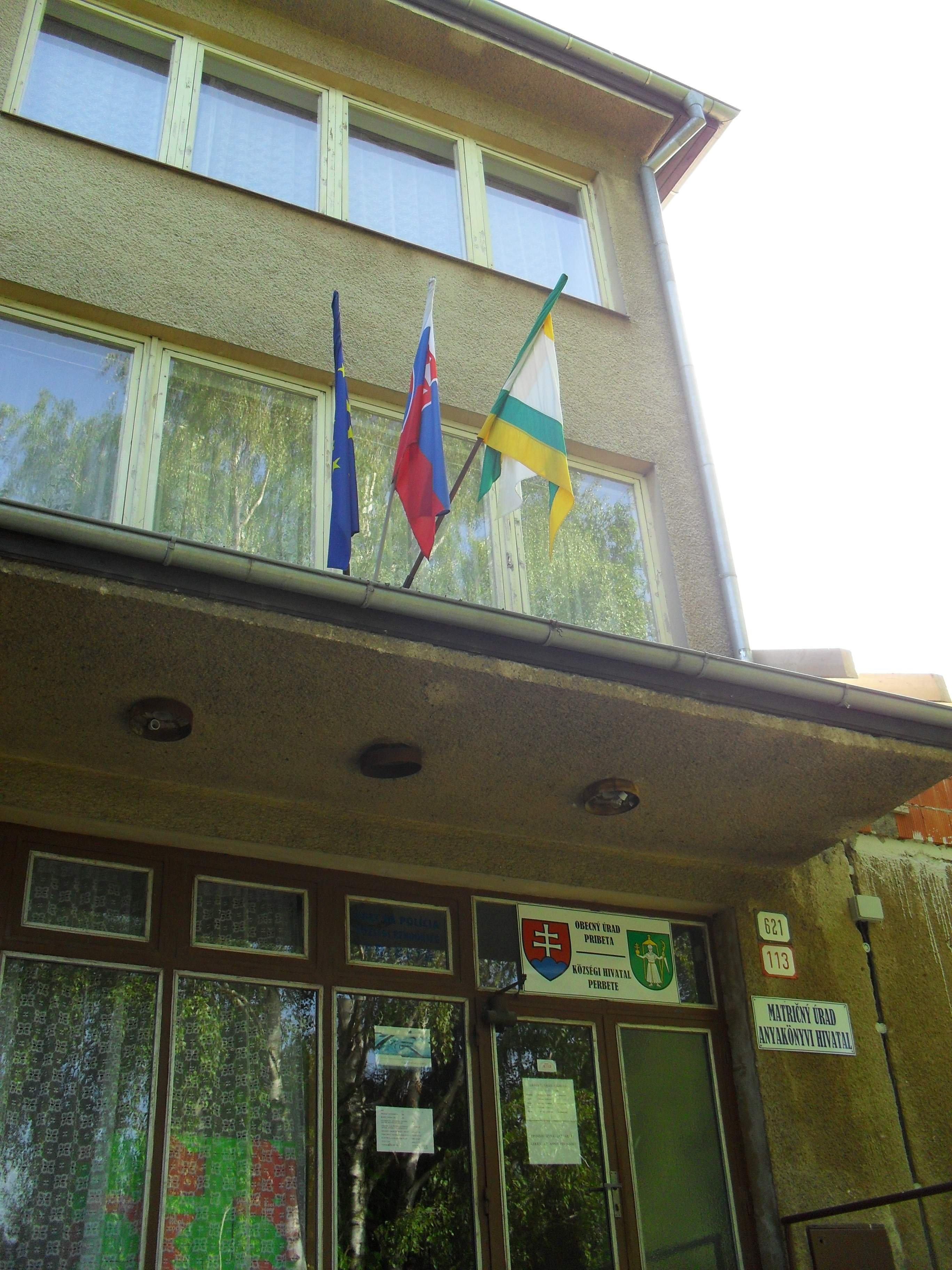 Perbete - községi hivatal